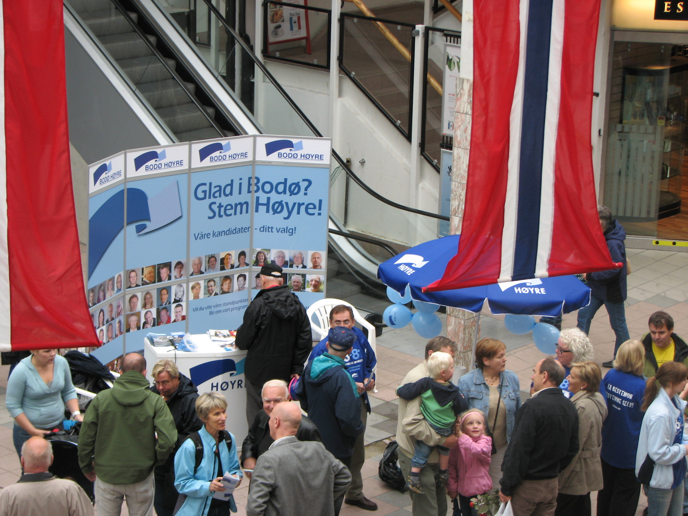 Valgkamp i Bodø, mer spesifikt Bodø Høyre